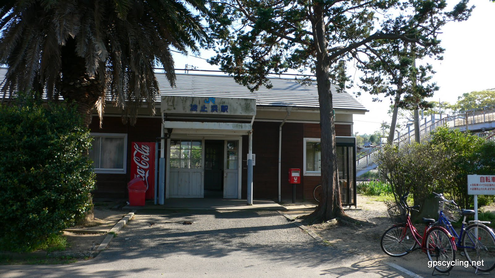 波止浜駅